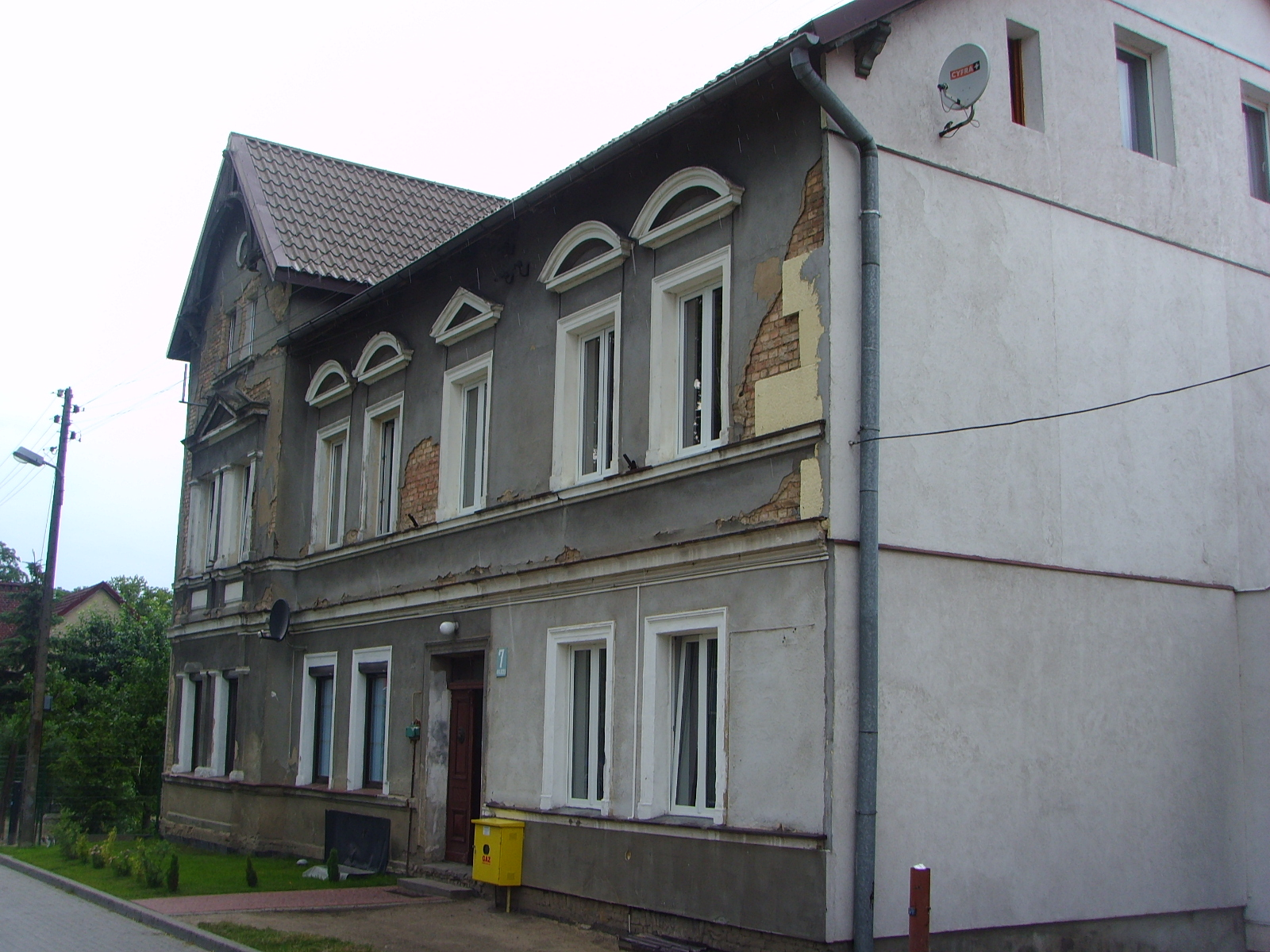 W tym budynku mieścił się Powiatowy Urząd Bezpieczeństwa Publicznego